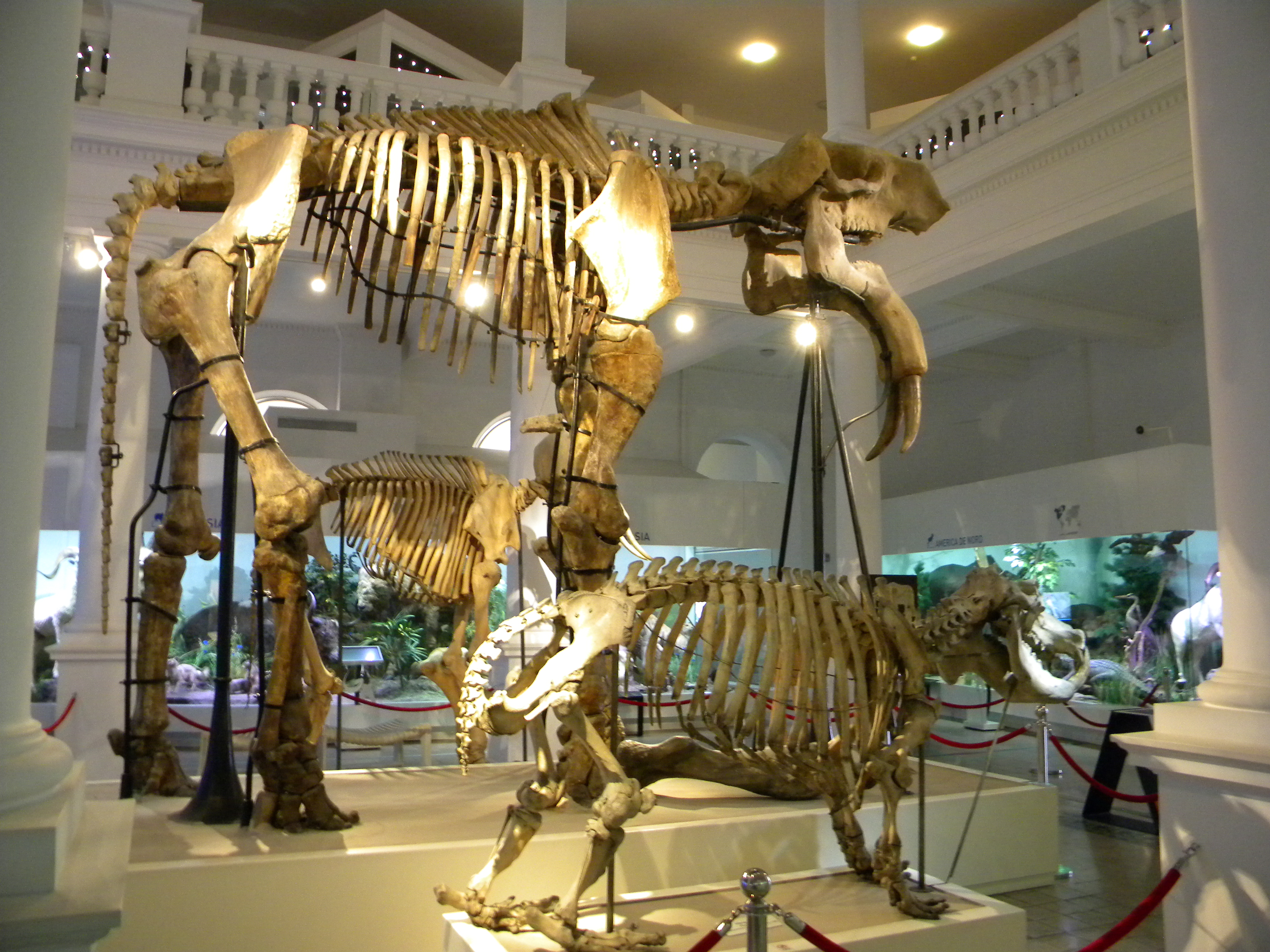 Bucuresti, Romania, Muzeul National de Istorie Naturala Grigore Antipa; B-II-m-A-18983 (Interior, detaliu 31)